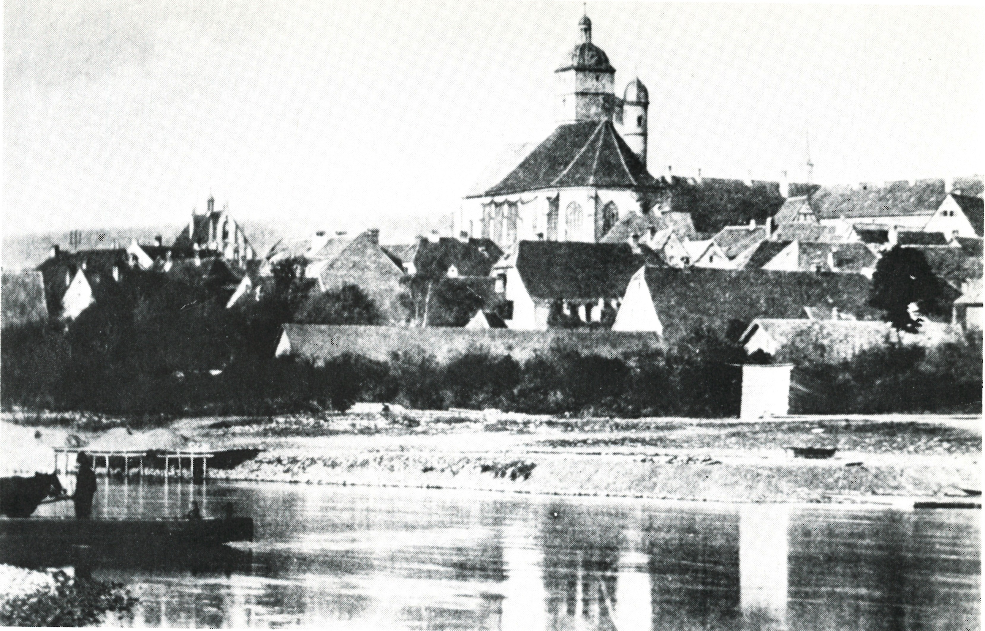 Fotografie, Dettelbach vom Main aus, mit Pfarrkirche St. Augustinus, um 1900